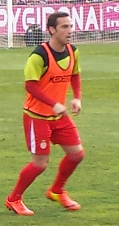 Jugador del Girona FC